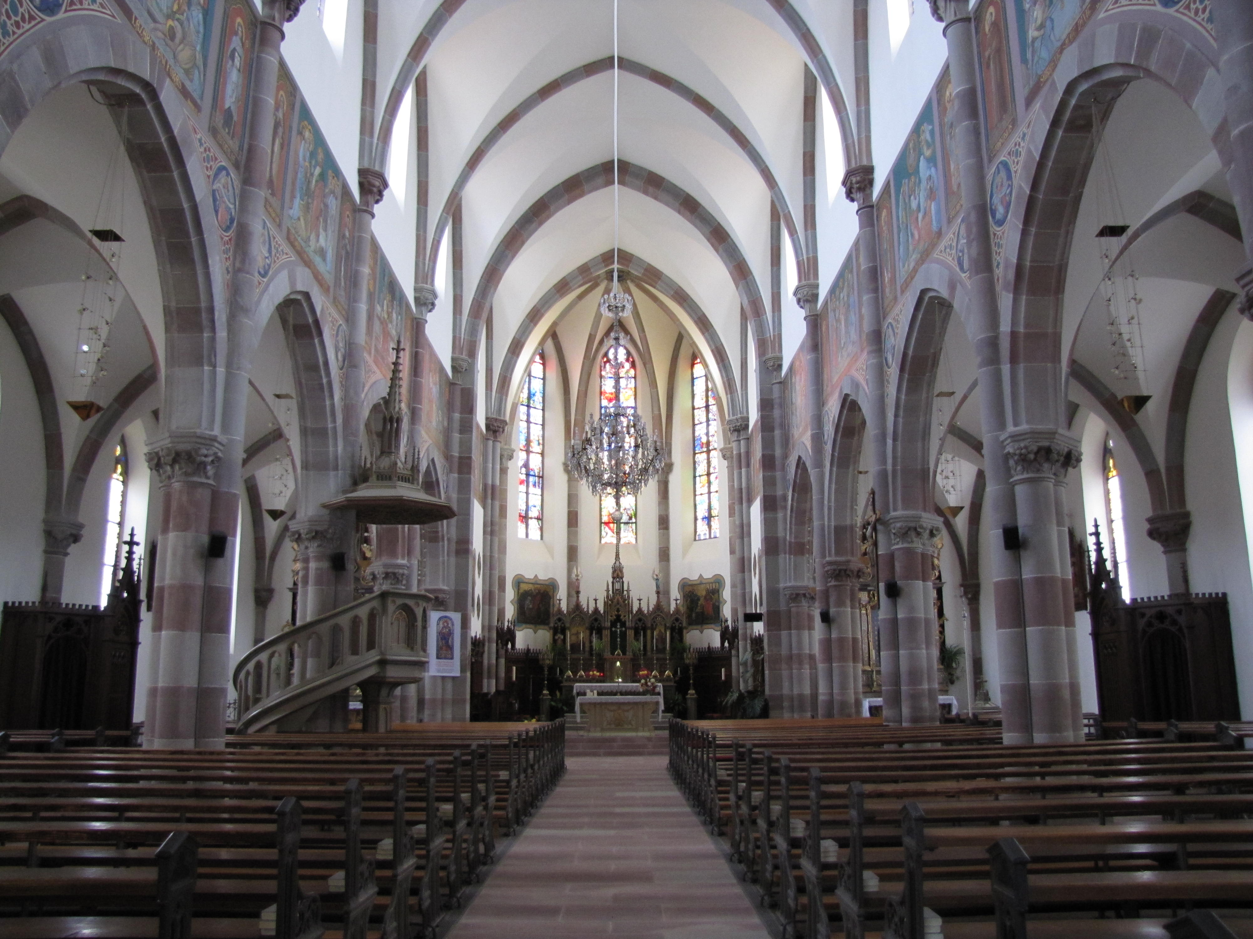 Alsace, Bas-Rhin, Église Saint-Étienne de Mackenheim (IA67010704). Vue intérieure de la nef vers le chœur.